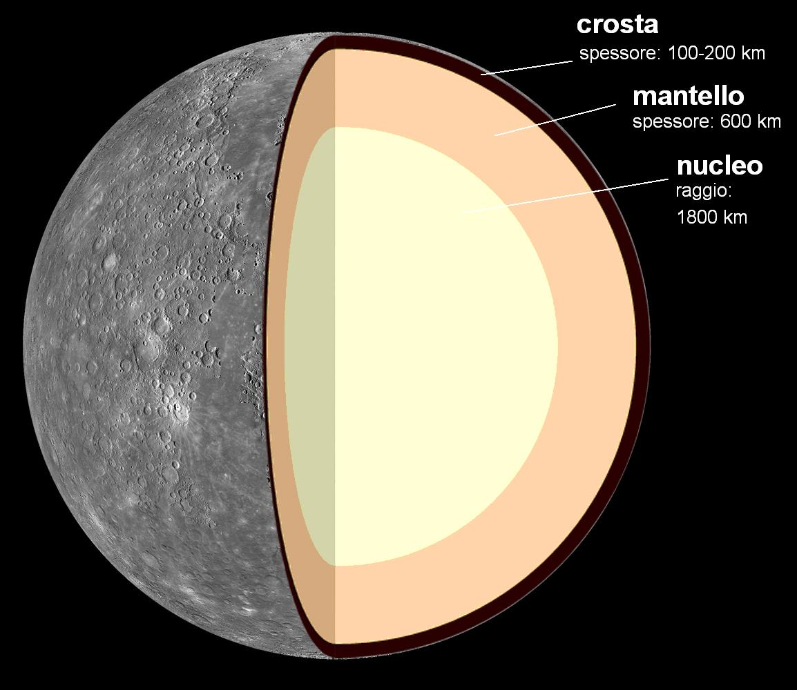 Schema della struttura interna del pianeta Mercurio Crosta - 100-200 km di spessore Mantello - 600 km di spessore Nucleo - raggio di 1.800 chilometri